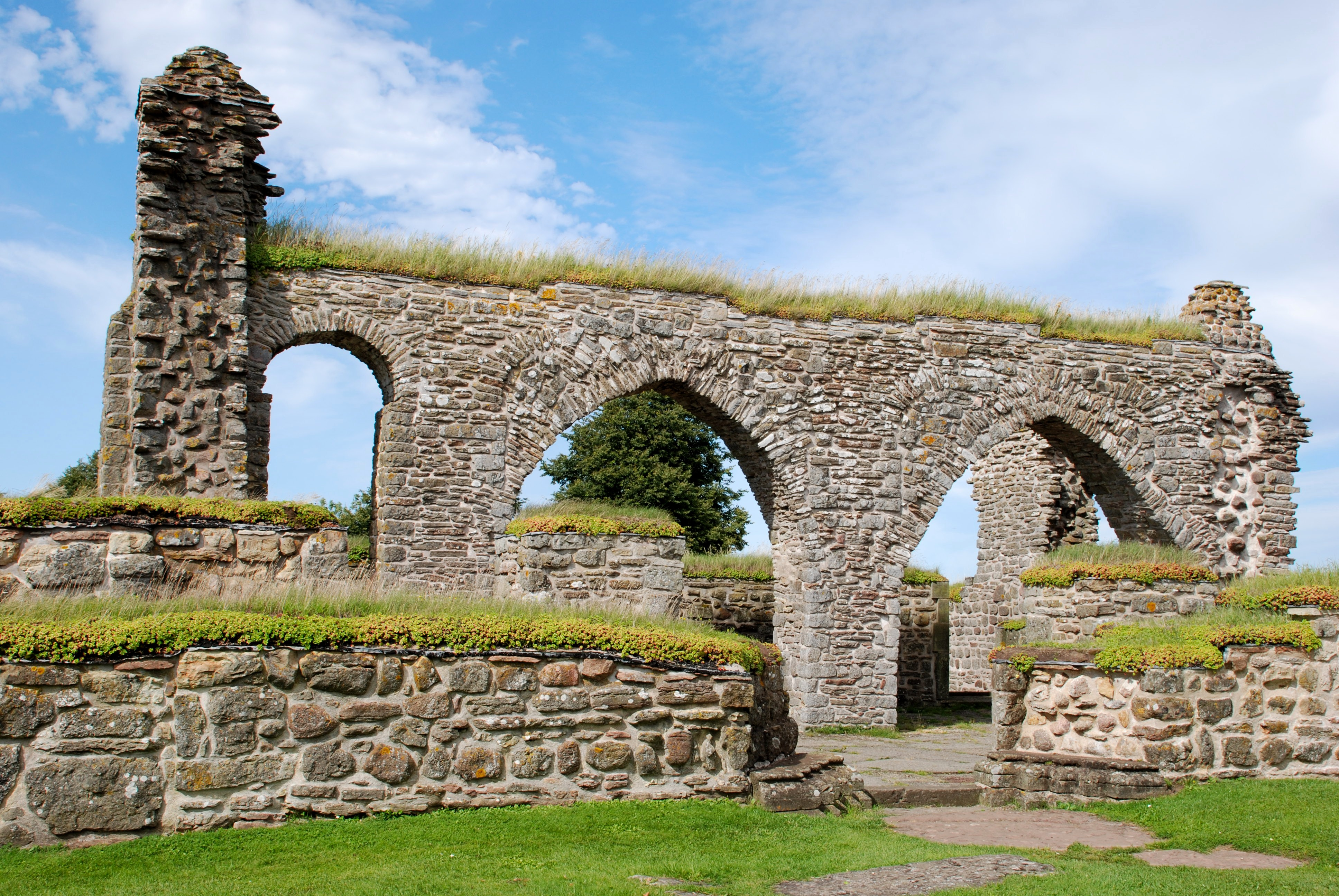 Gudhem 72:1